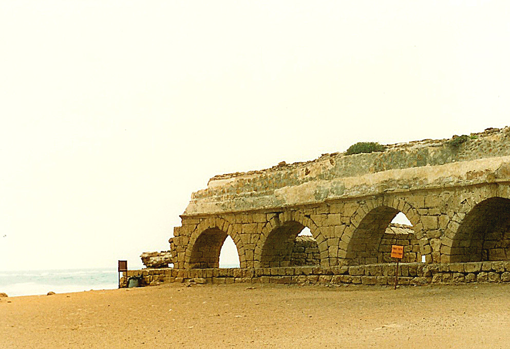 Caesarea: Déi al Festung Source: Eege Foto vum User:Ernmuhl Lizenz:GDFL